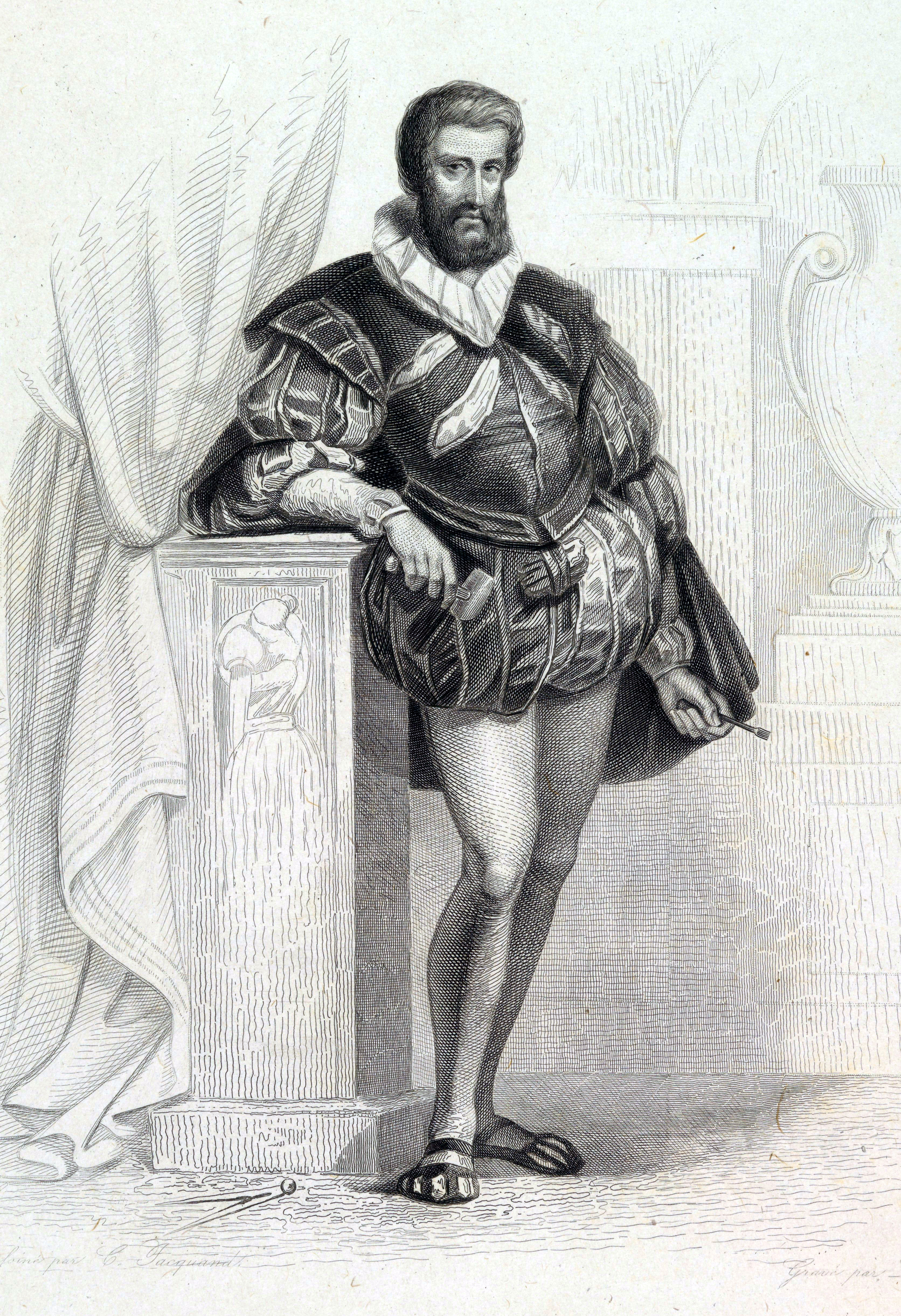 Jean Goujon